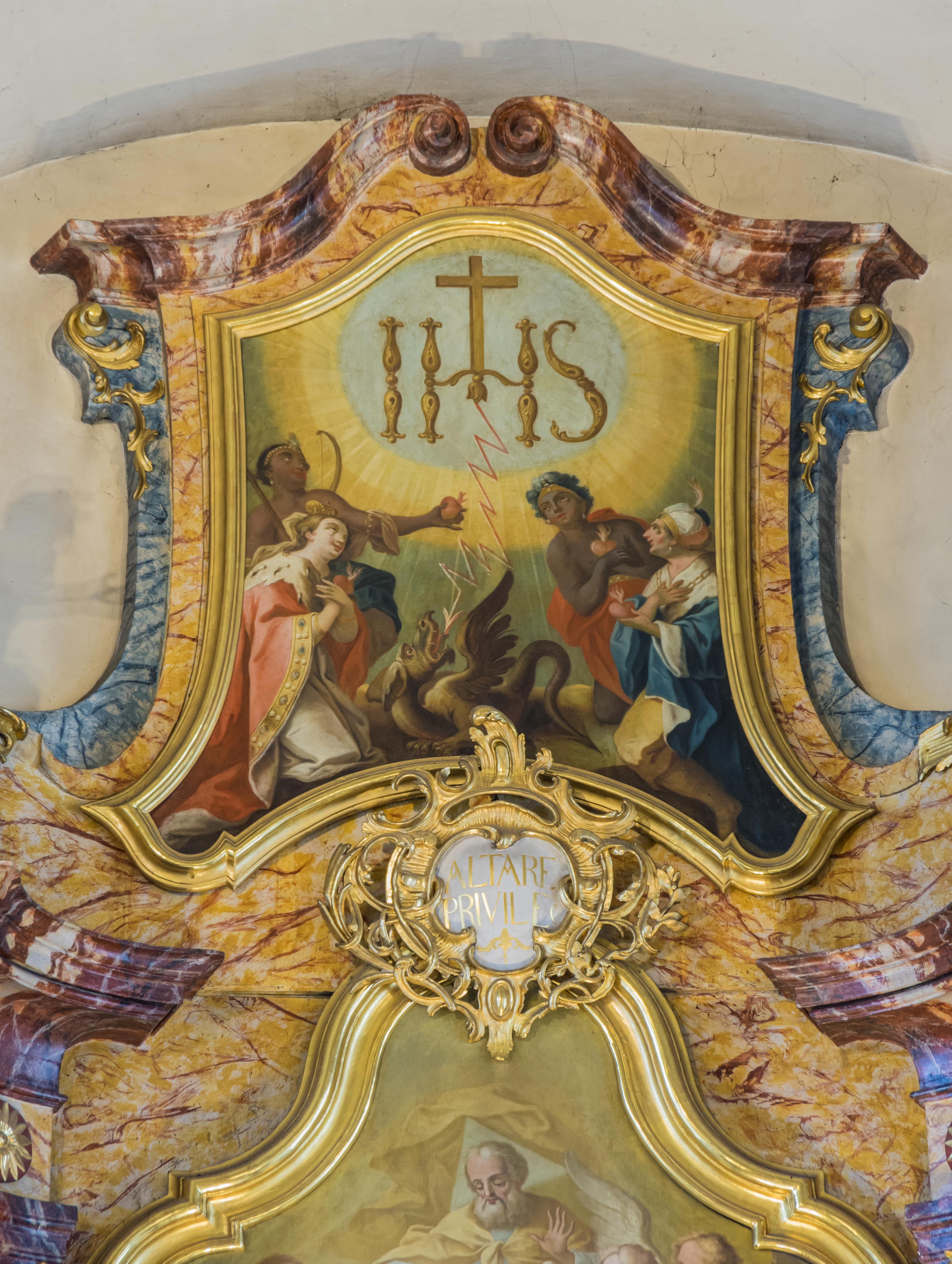 Bilder aus Wyhl am Kaiserstul hier die katholische Pfarrkirche St. Blasius Bild in der Spitze des Hauptaltars